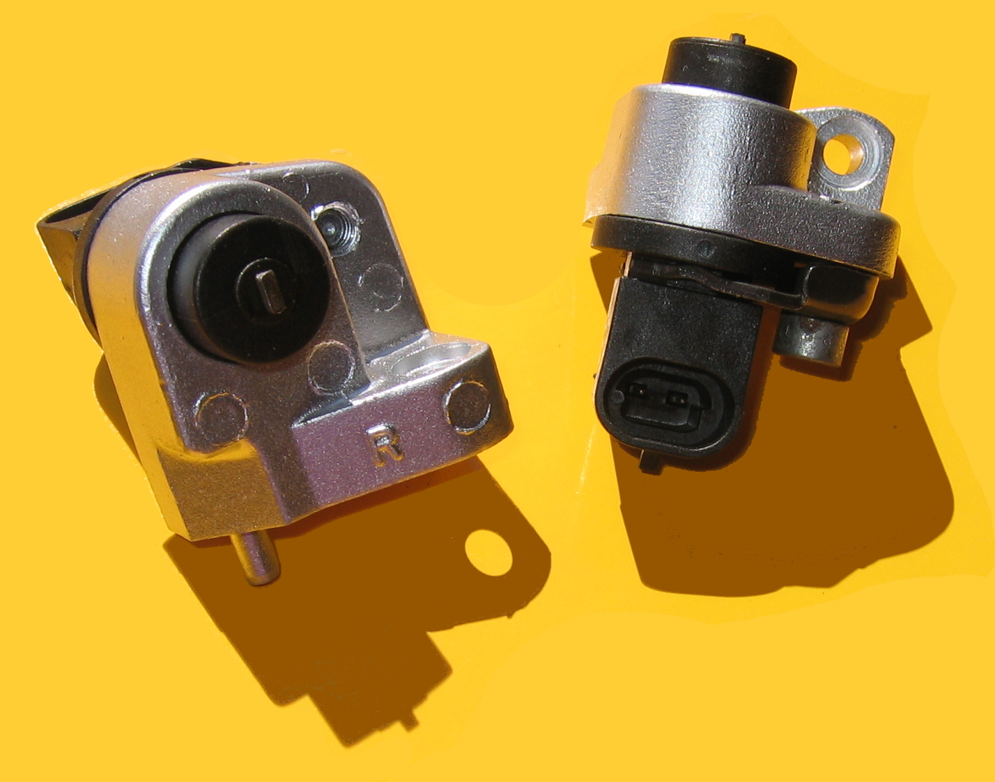 ABS Sensor GM